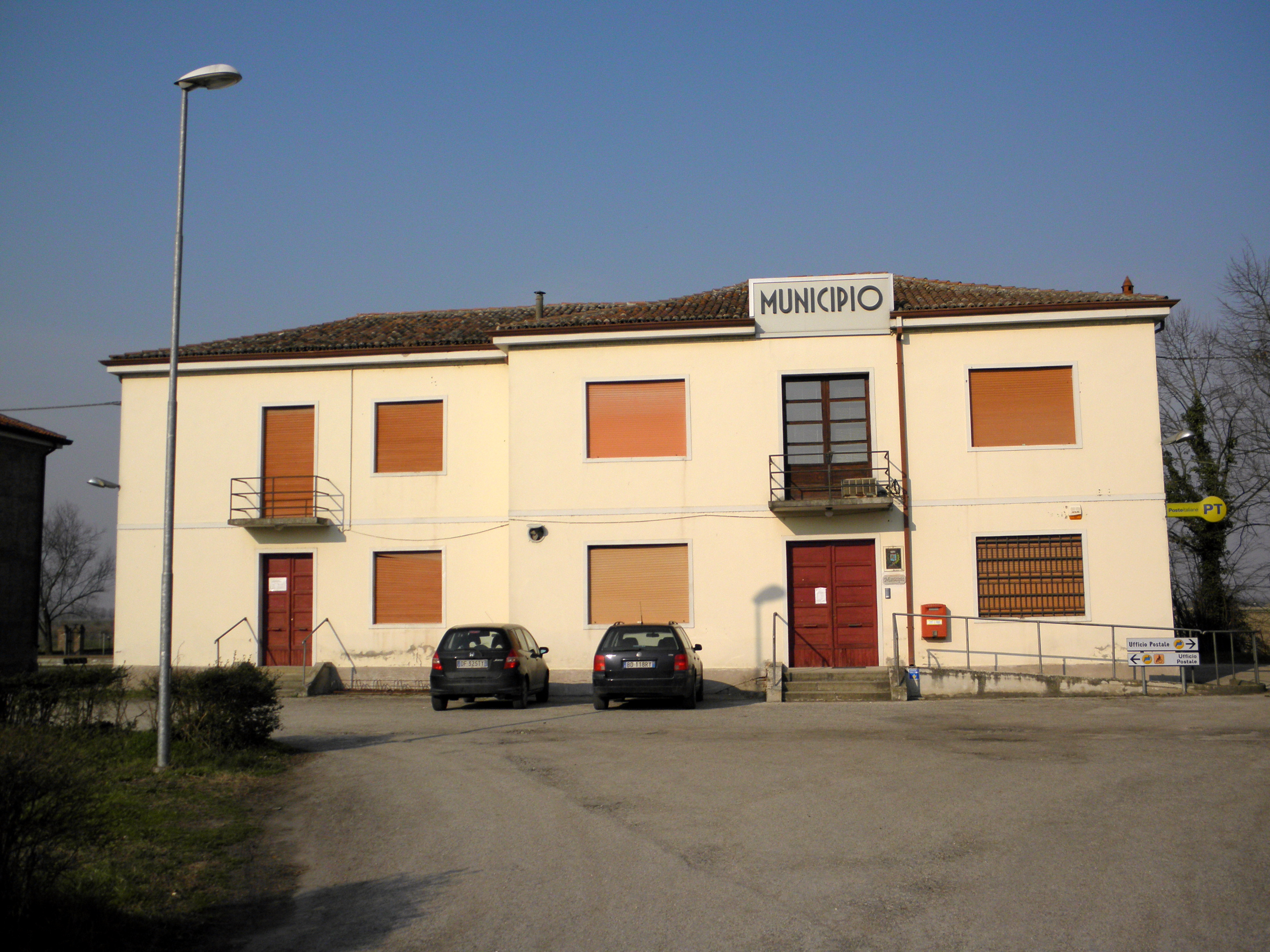 Barbona, comune della provincia di Padova: il municipio.